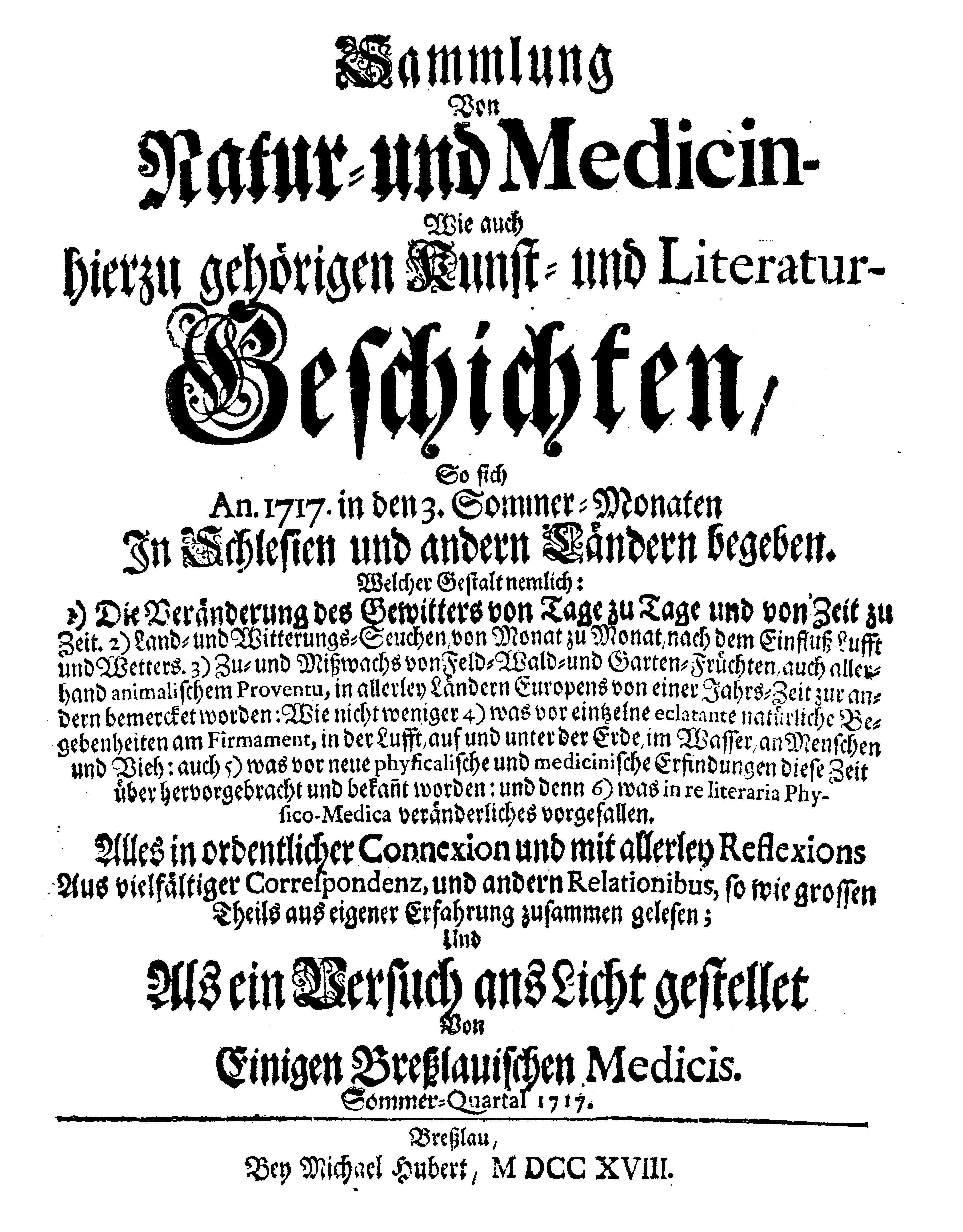 Titelseite der Breslauischen Sammlungen 1718, Naturwissenschaftliches Organ. Das Journal bietet übersetzt in heutige Deutsch neueste Berichte aus Natur und Medizin mit zugehörigen Informationen über neueste technische Erfindungen ("Kunst-Geschichte") und wissenschaftliche Publikationen ("Literatur-Geschichte") aus dem Bereich. Der Titel offenbart in seinem Angebot von "Kunst-" und "Literaturgeschichten", daß sowohl das Wort "Kunst" wie das Wort "Literatur" zu Beginn des 18. Jahrhunderts gänzlich andere Gegenstandsbereiche zu Diskussions und Rezensionsobjekten erhoben.